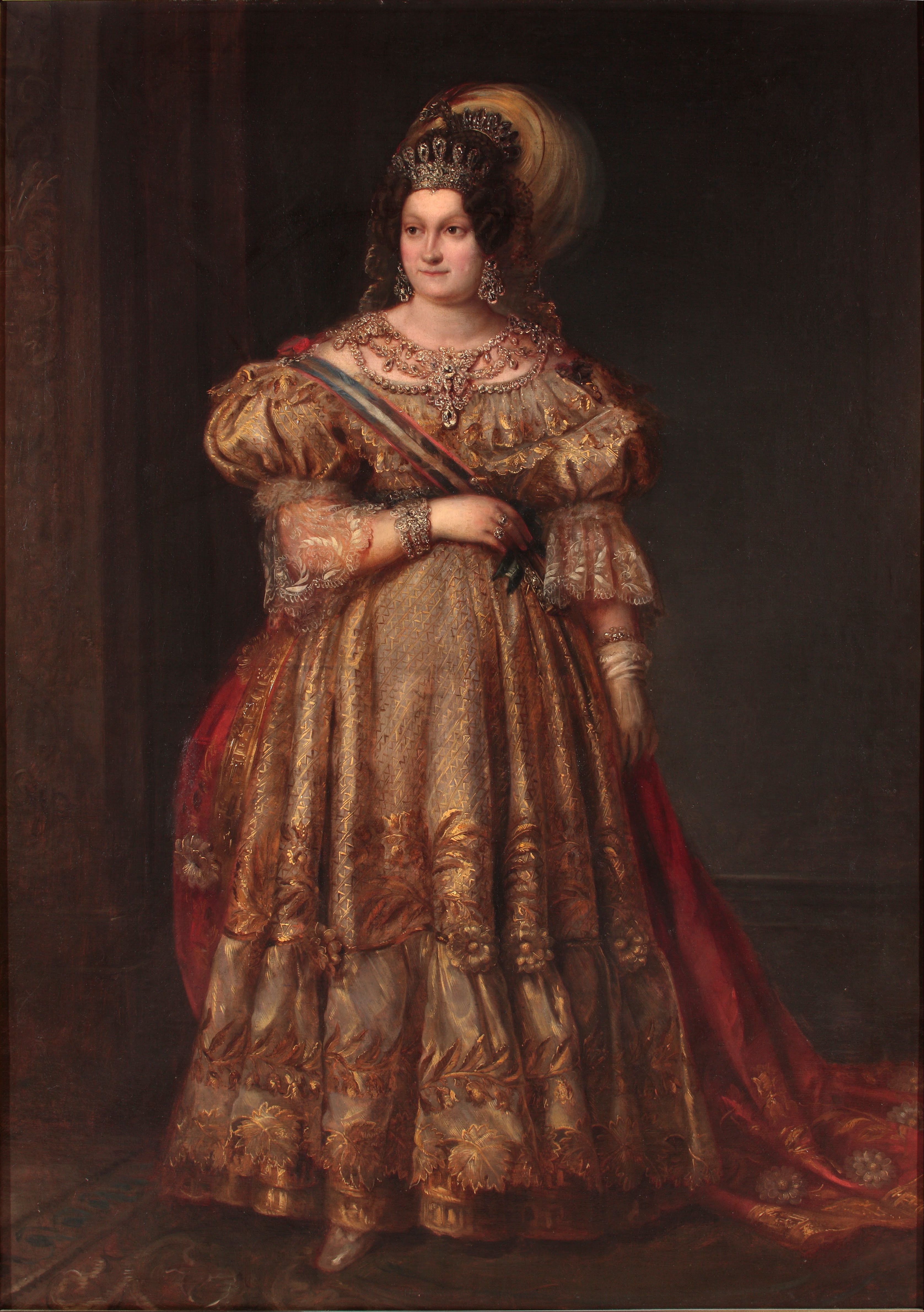 Retrato de la reina María Cristina de Borbón-Dos Sicilias (1806-1878), que fue la cuarta esposa del rey Fernando VII de España y la madre de la reina Isabel II, durante cuya minoría de edad actuó como regente del Reino.